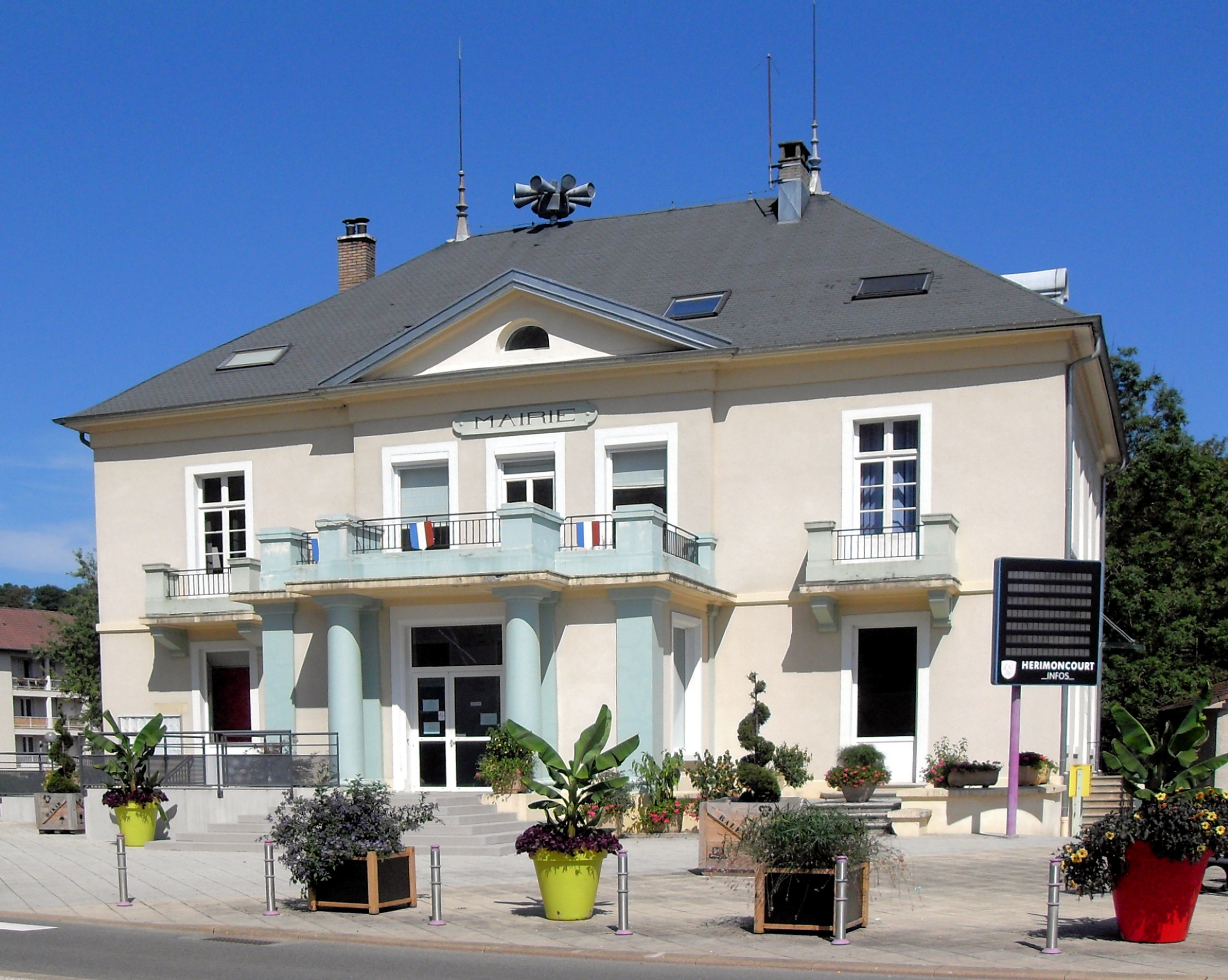 La mairie d'Hérimoncourt